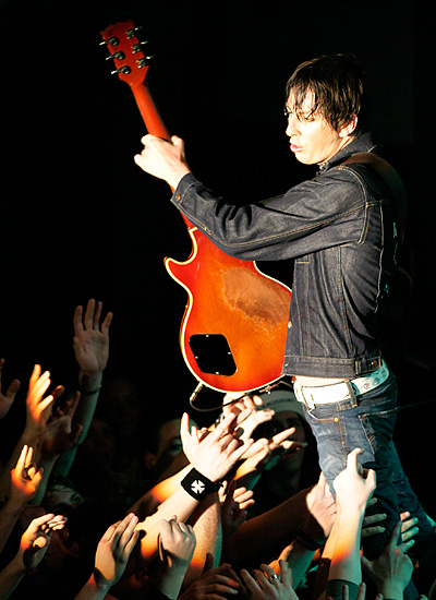 Turboneger på Folken, Stavanger, 2. mai 2005. Knut Schreiner playing.